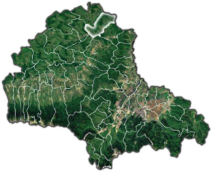 Homorod jud Brasov